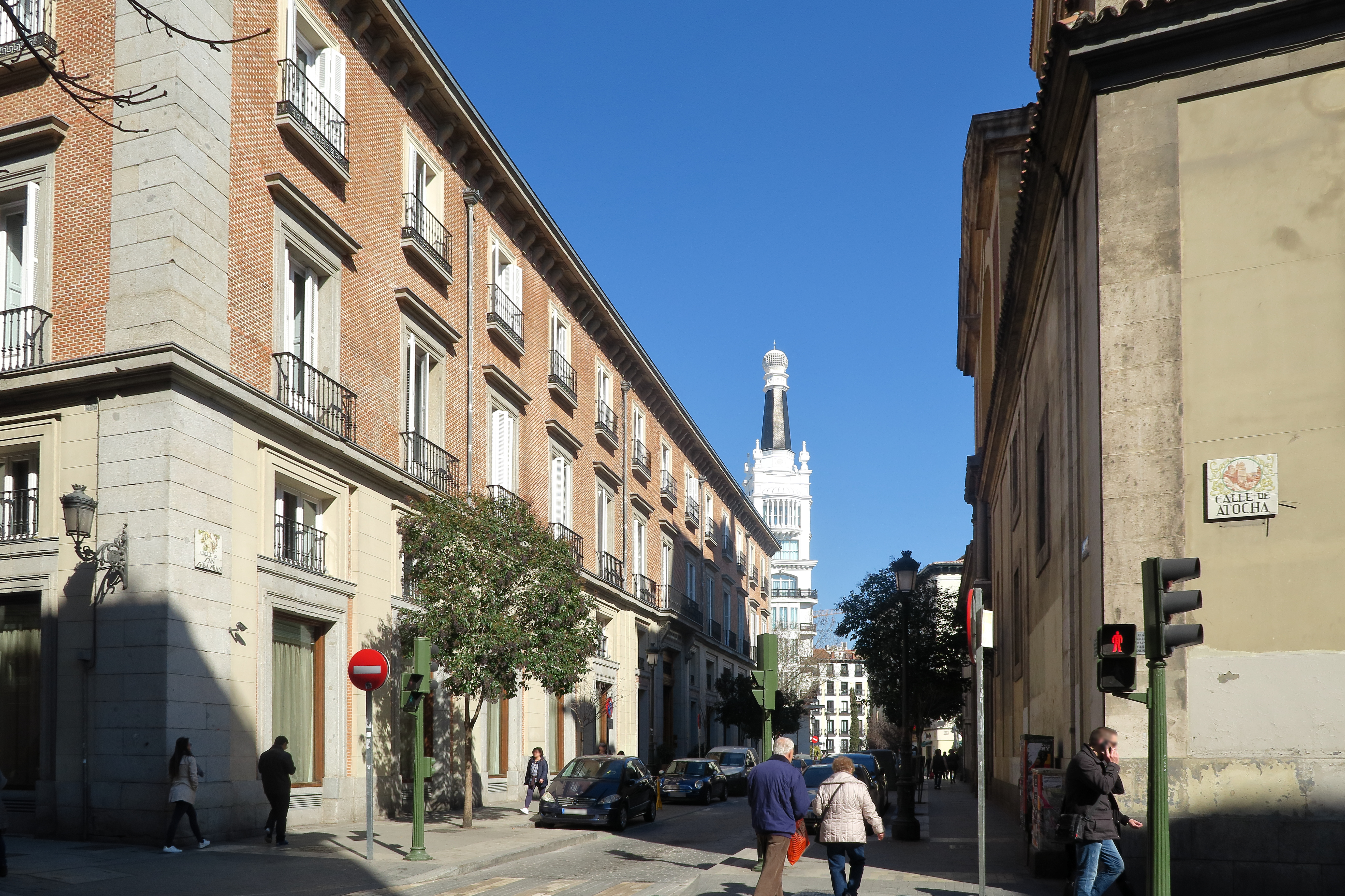 Calle de San Sebastian, desde la calle Atocha